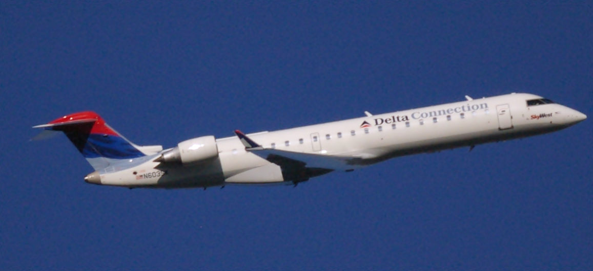 A Bombardier CRJ-700 regional jet in Delta Connection colors